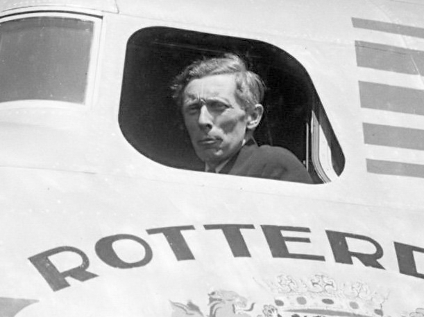 De nieuw gedoopte KLM DC 4 Skymaster "Rotterdam" op de luchthaven Schiphol. Op de bok zit gezagvoerder Adriaan Viruly. 9 mei 1946